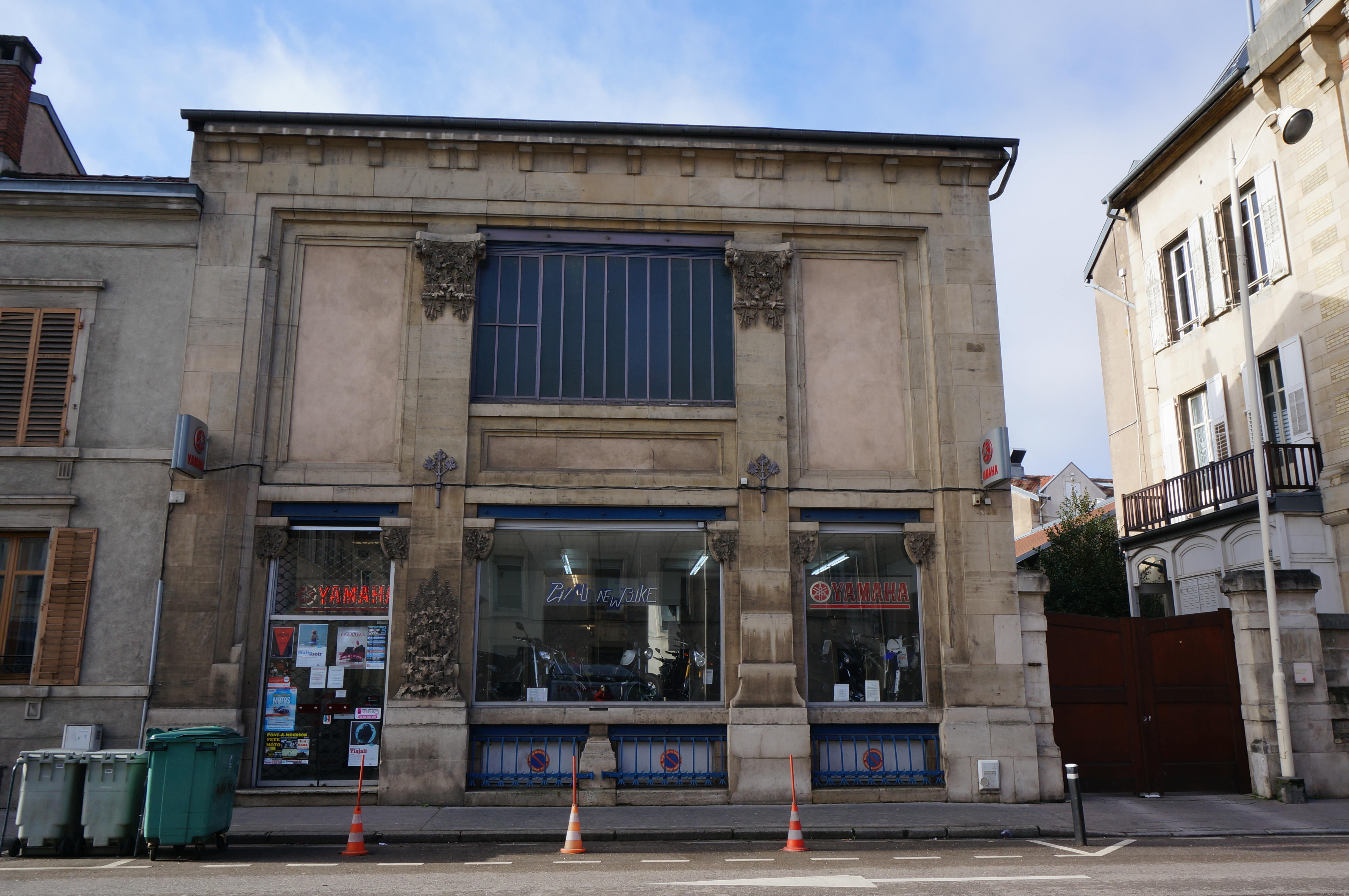 Monument historique de Nancy.